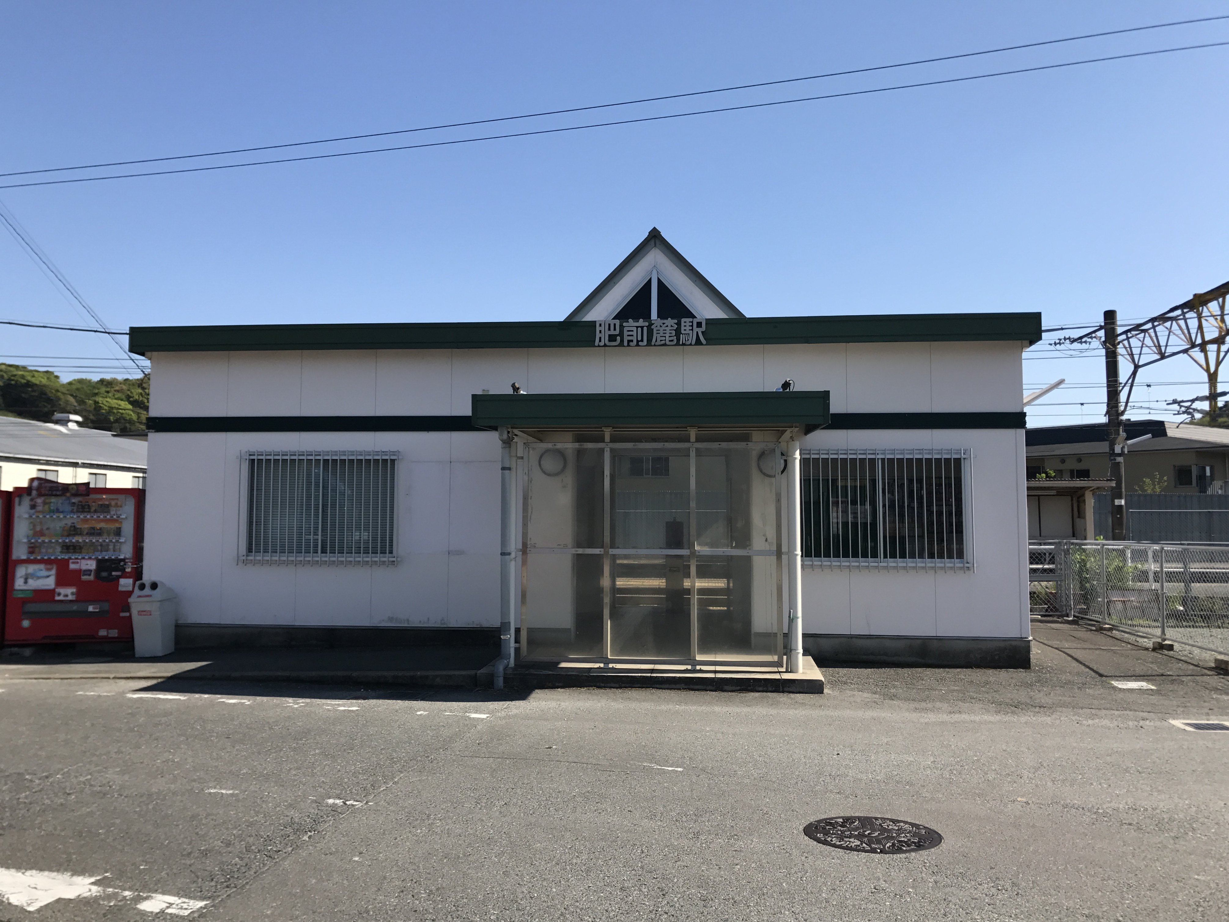 肥前麓駅駅舎